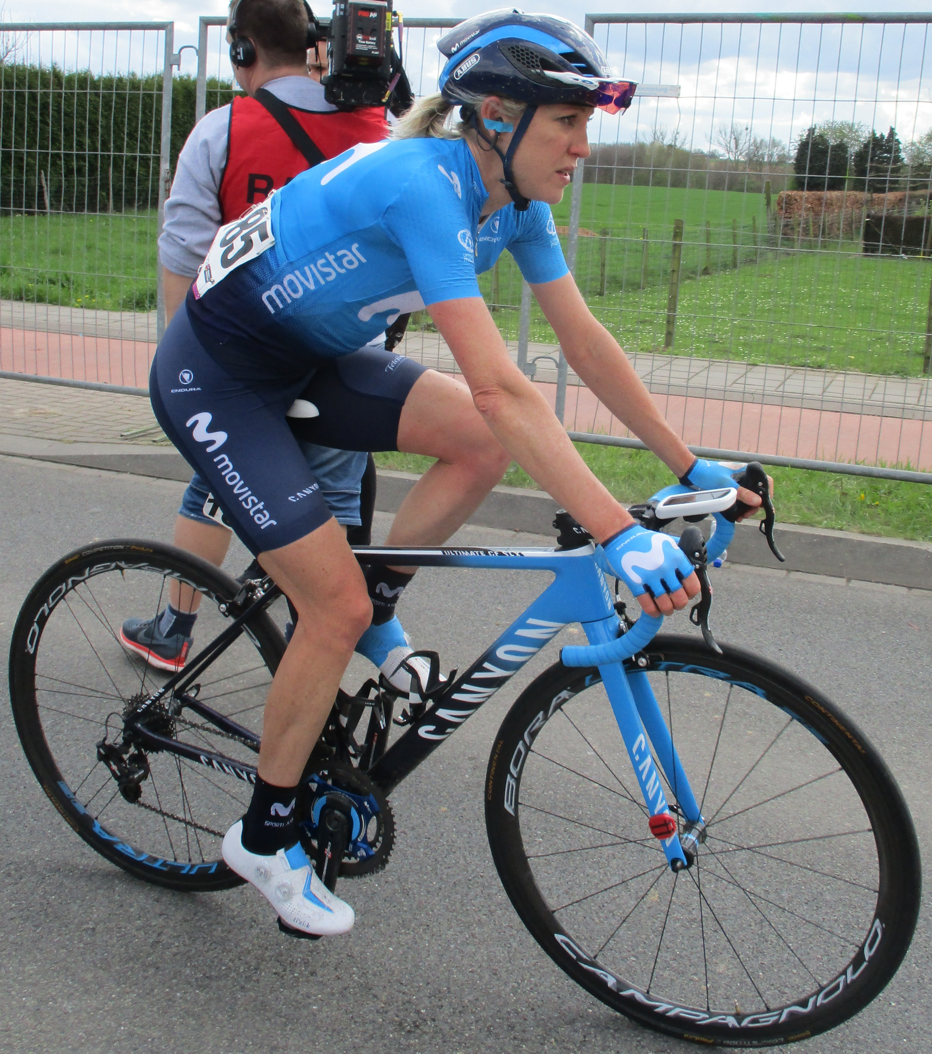 Finish van de Amstel Gold Race Ladies Edition 2018 in Berg, Valkenburg aan de Geul.